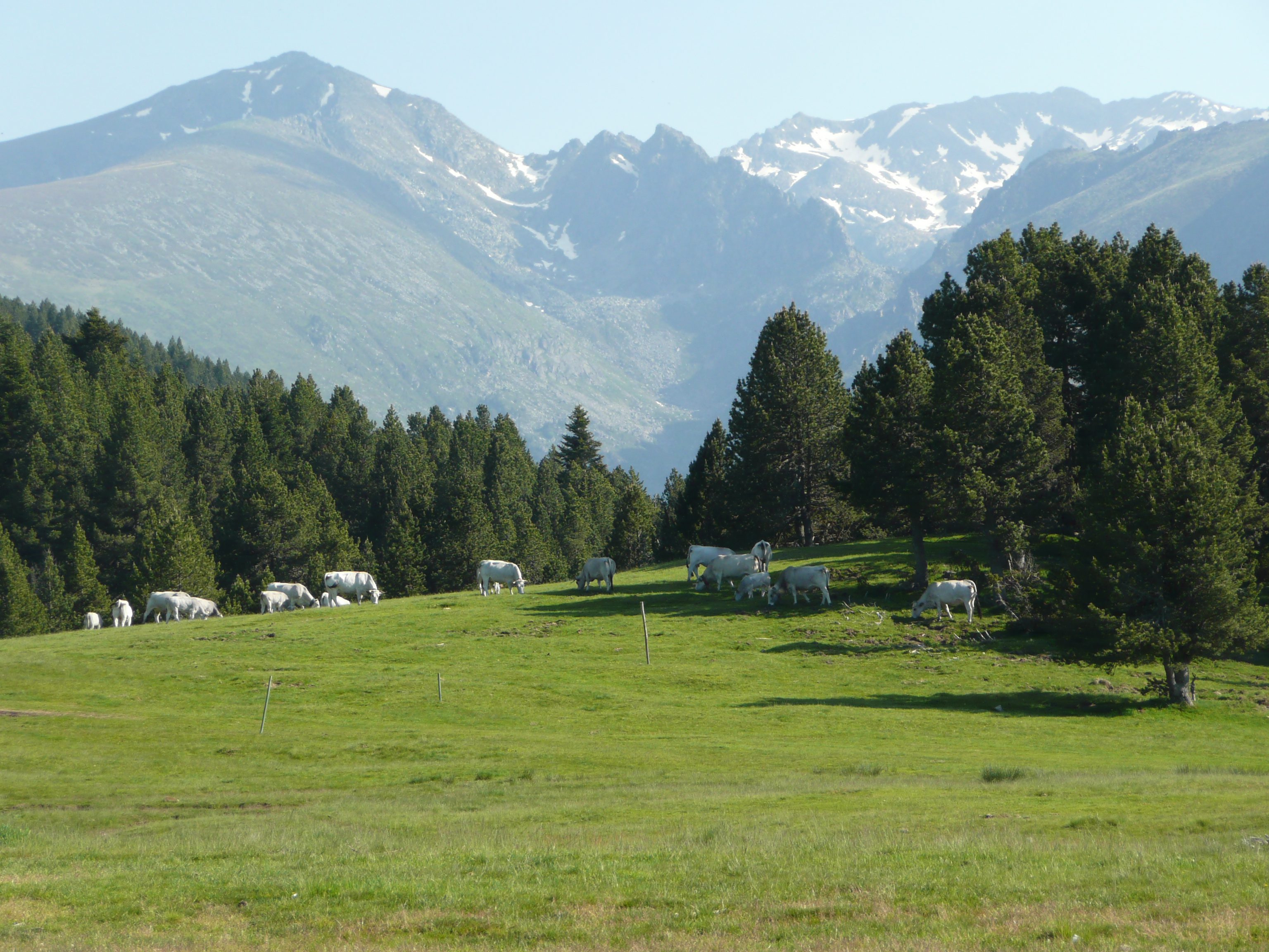 Les Isarges, plateau de Beille, Ariège, vaches gasconnes